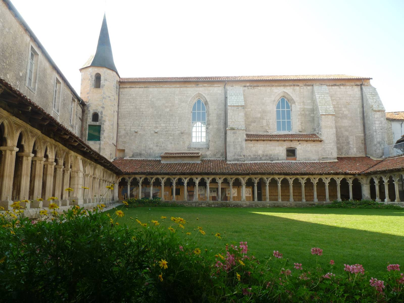 cloître de la Rochefoucauld (16), France